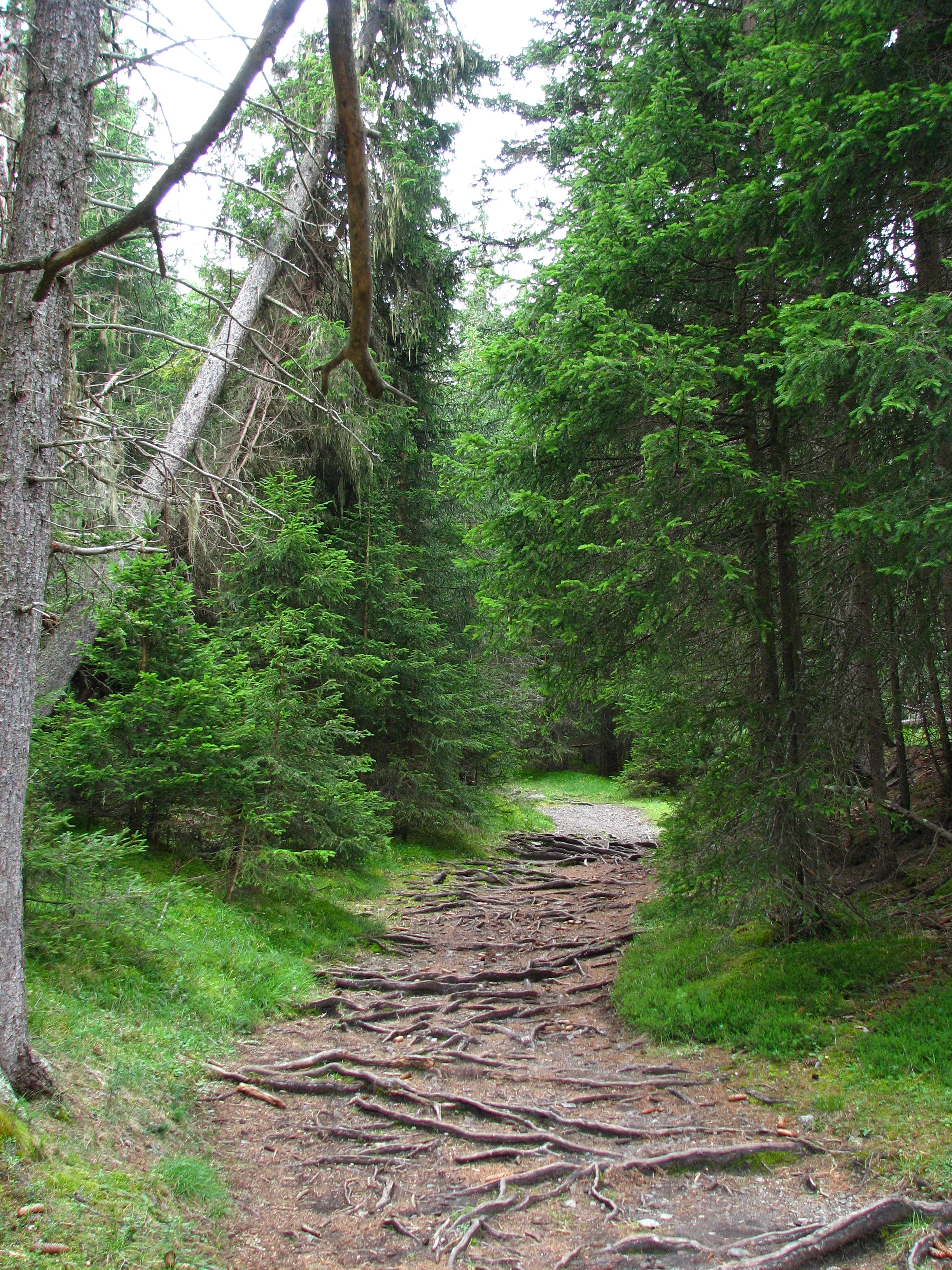 Wald im unteren Talbereich der Val Mingèr